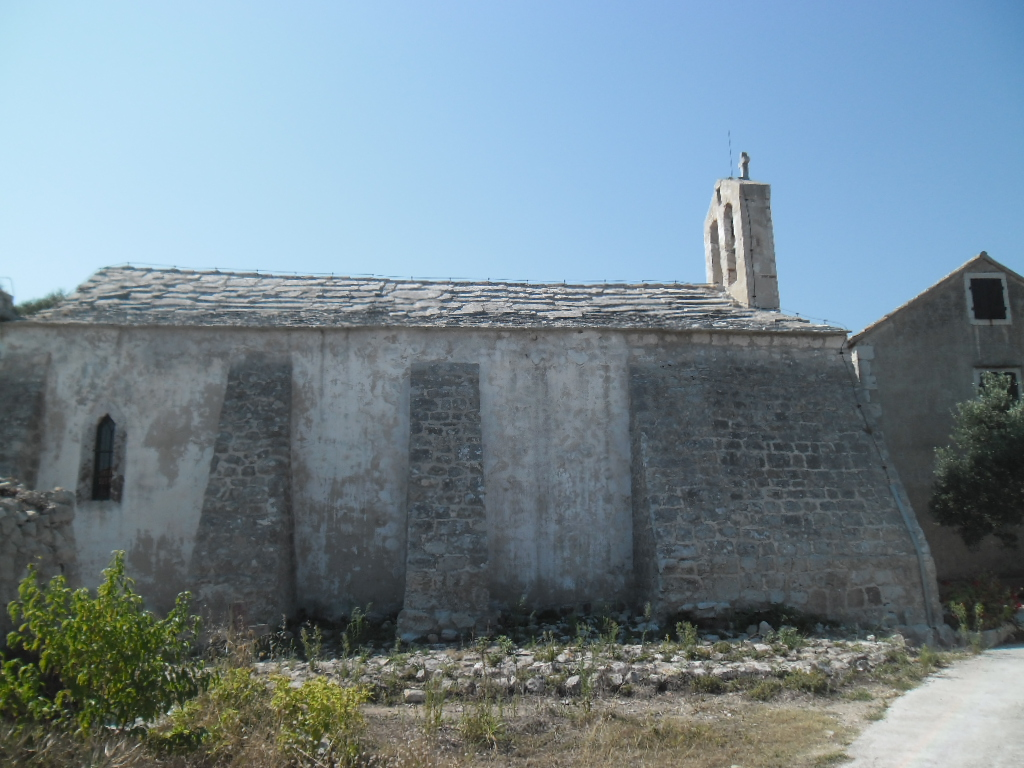 crkva na otoku Biševu